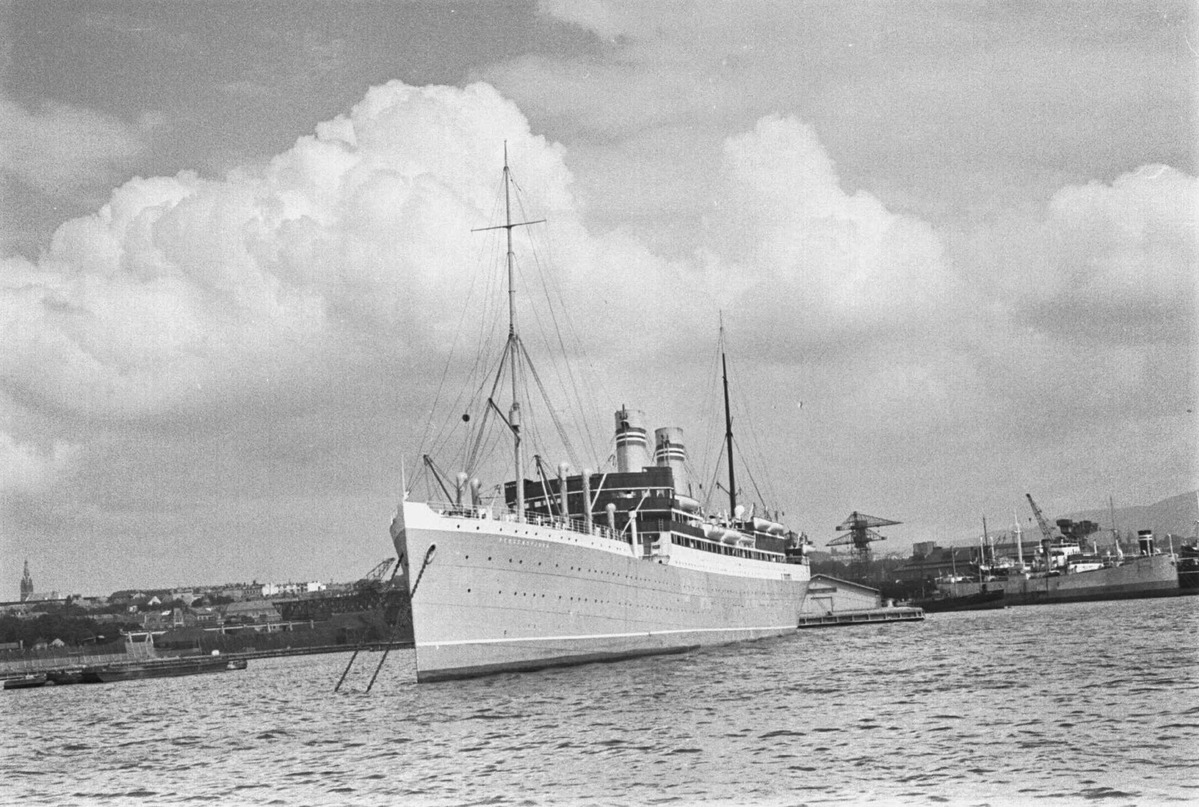 Bergensfjord i opplag, Oslo havn 1938